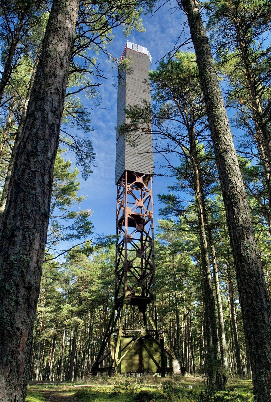 Prangli kagu tulepaak